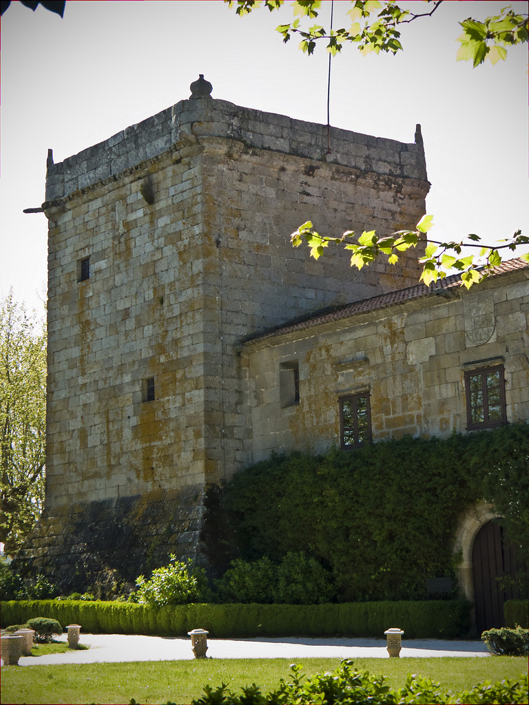 Fortaleza do século XIII. Foi derruida polos Irmandiños no 1467. Na actualidade consérvase a torre, que sufriu importantes modificacións e un pazo de estilo renacentista de inspiración italiana que se distribúe no seu interior por medio dun pequeno e sinxelo claustro. É propiedade privada e, a pesar de estar declarado Monumento Histórico Artístico de Interés Nacional, a súa visita non está permitida. Patrimonio galego para bodas, sic...